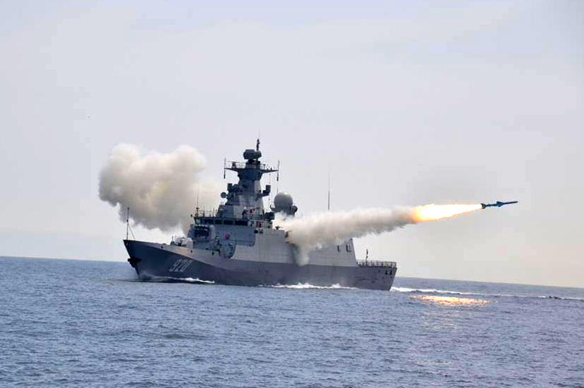 Exercice de tir réalisé par la corvette de classe C28A de la Marine algérienne.